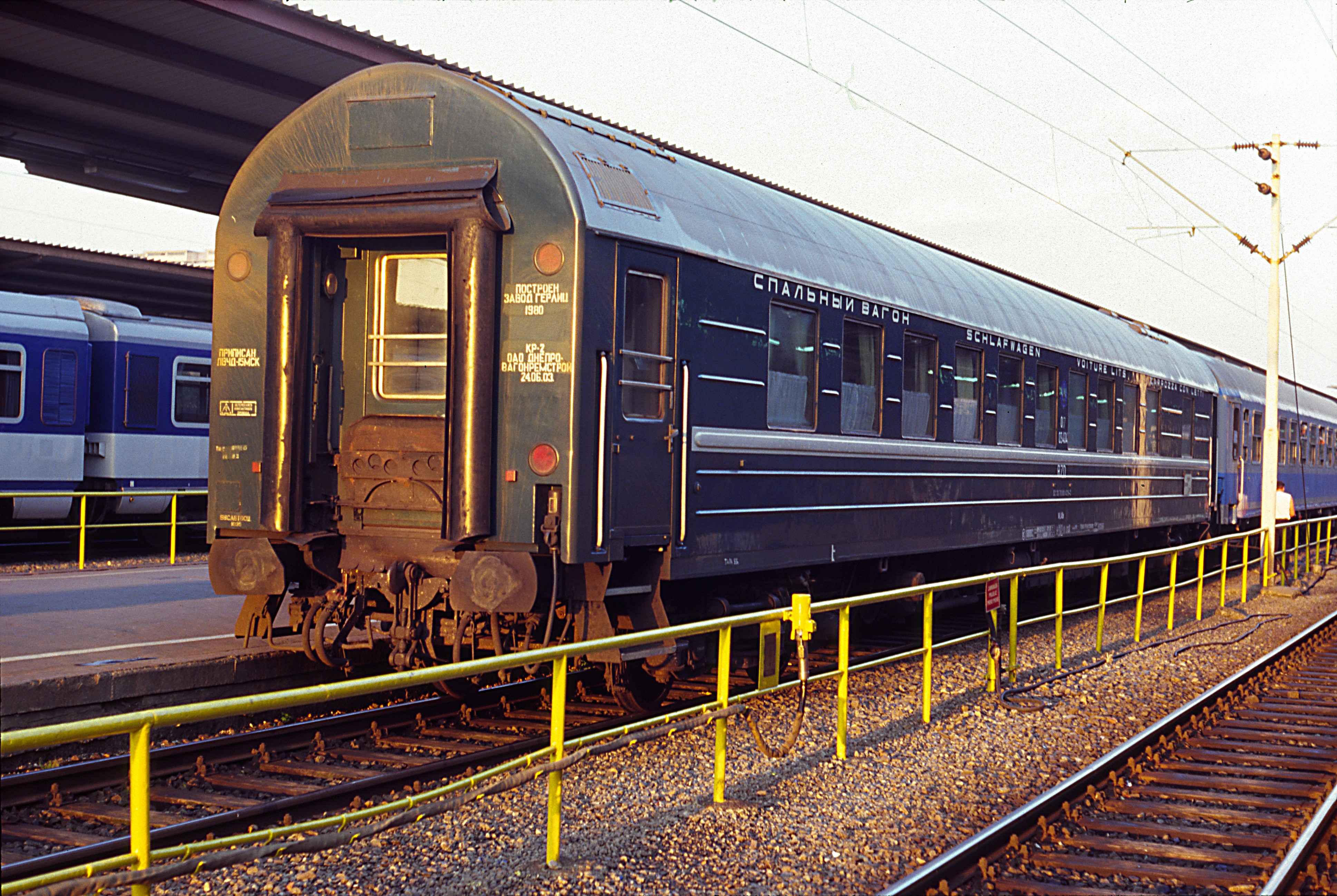 Umspurbarer Schlafwagen, einsetzbar auf Regel- sowie auf russischer und iberischer Breitspur, geliefert vom Waggonbau Görlitz, noch im Ursprungszustand